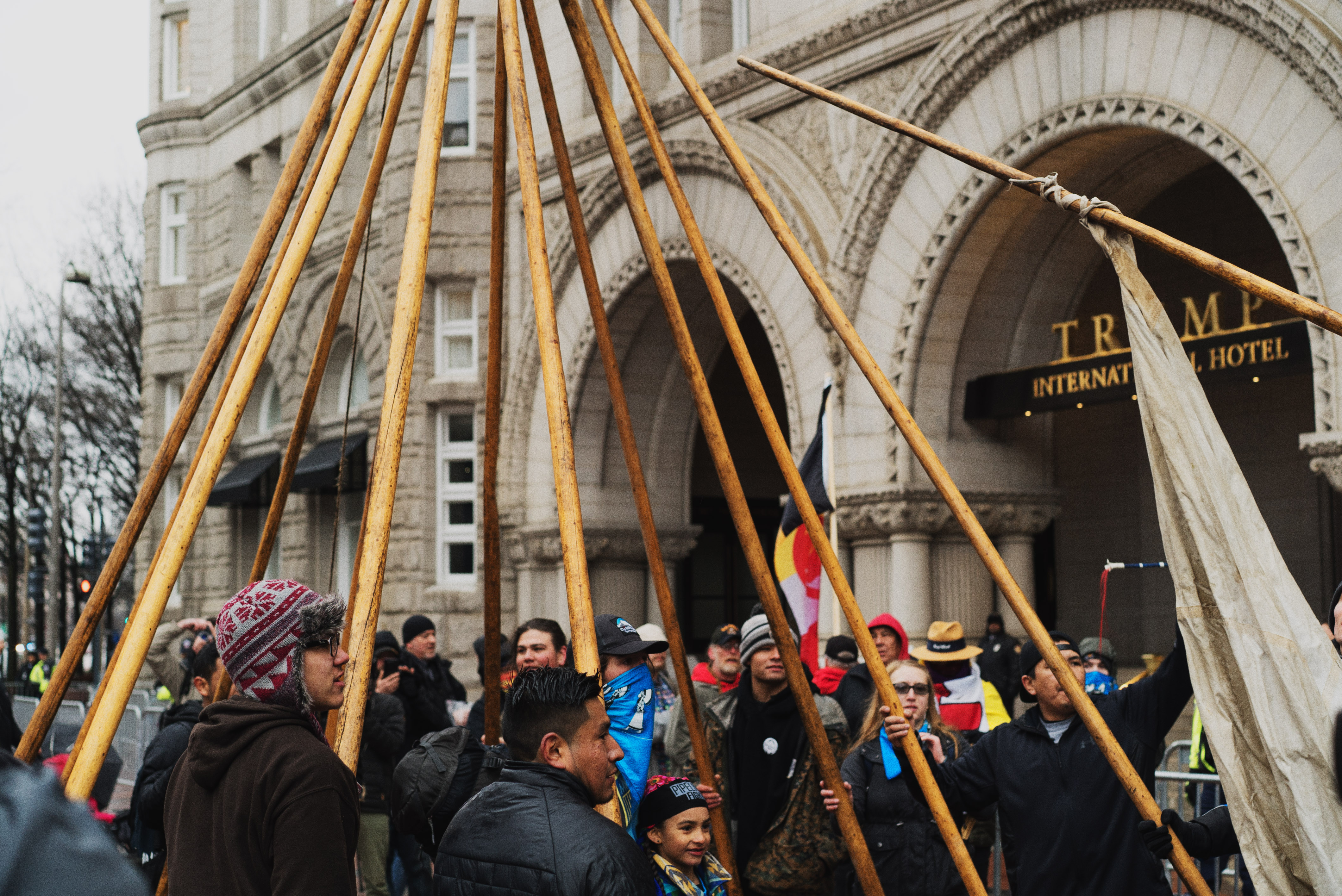 Washington, DC. March 10, 2017.